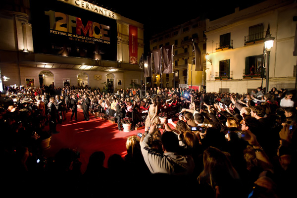 Aspecto exterior del Teatro Cervantes durante el Homenaje que recibió el actor Juan Diego en XXII Festival de Cine de Málaga 2009.